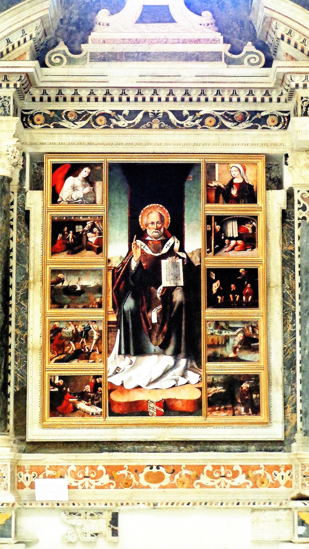 Cappella altare di San Nicola di Bari. Ripristino con copia del preesistente dipinto raffigurante San Nicola in cattedra con storie della sua vita del pittore Antonino Giuffrè.